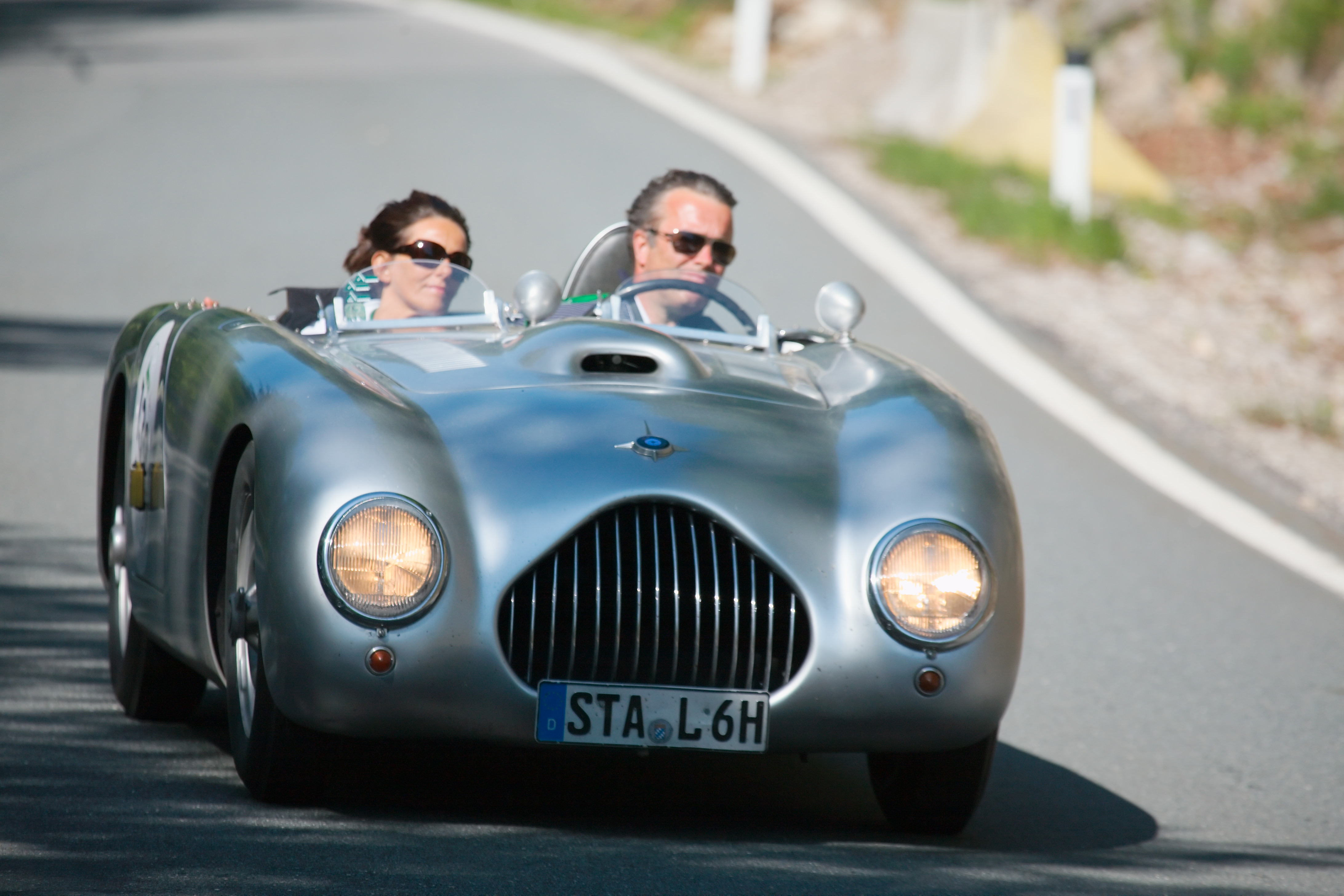 Veritas Nürburgring at Gaisbergrennen 2009